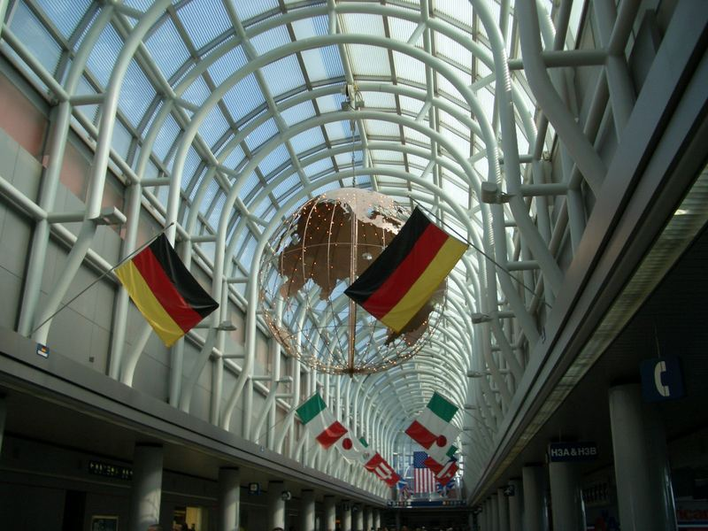 Флаги в Терминале 3.